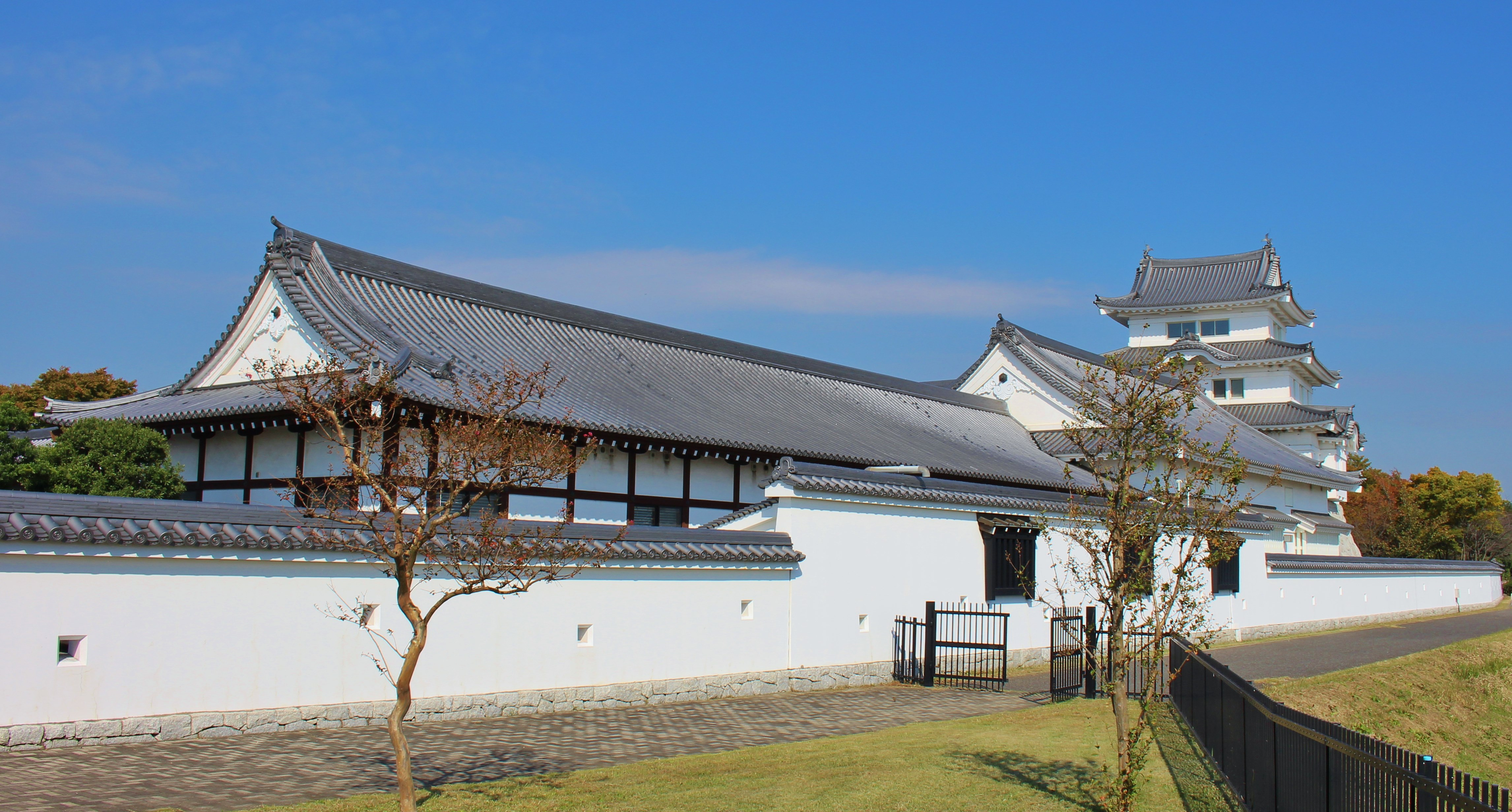 関宿城